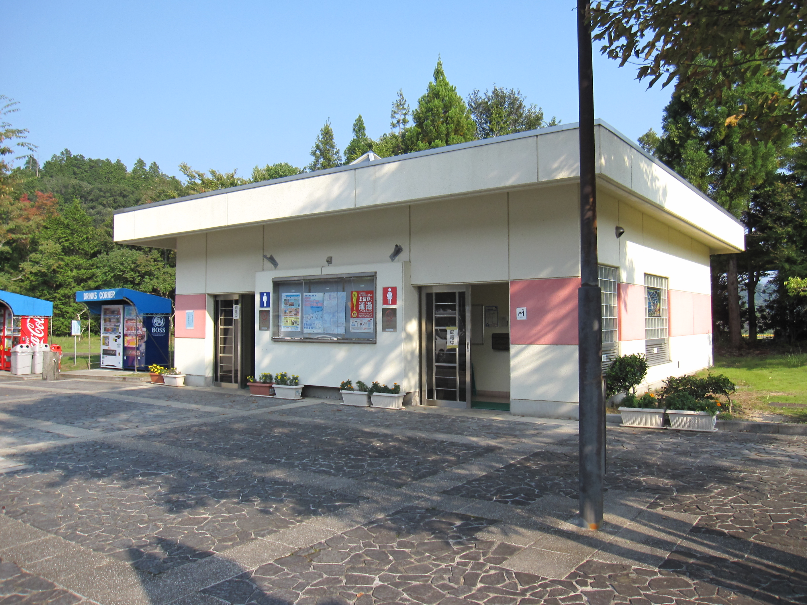 綾部パーキングエリア上り線側施設